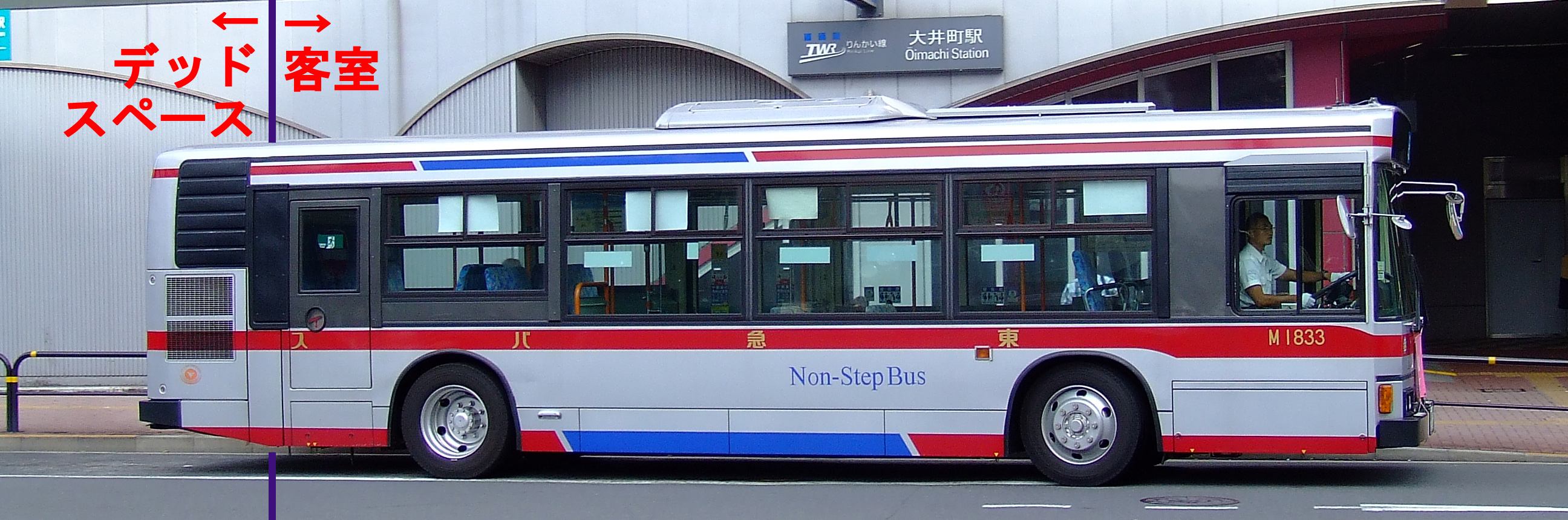 東急バス目黒営業所M1833号車（日野・ブルーリボンノンステップバス） 初期のノンステップバスは車体後部のデッドスペースが大きい